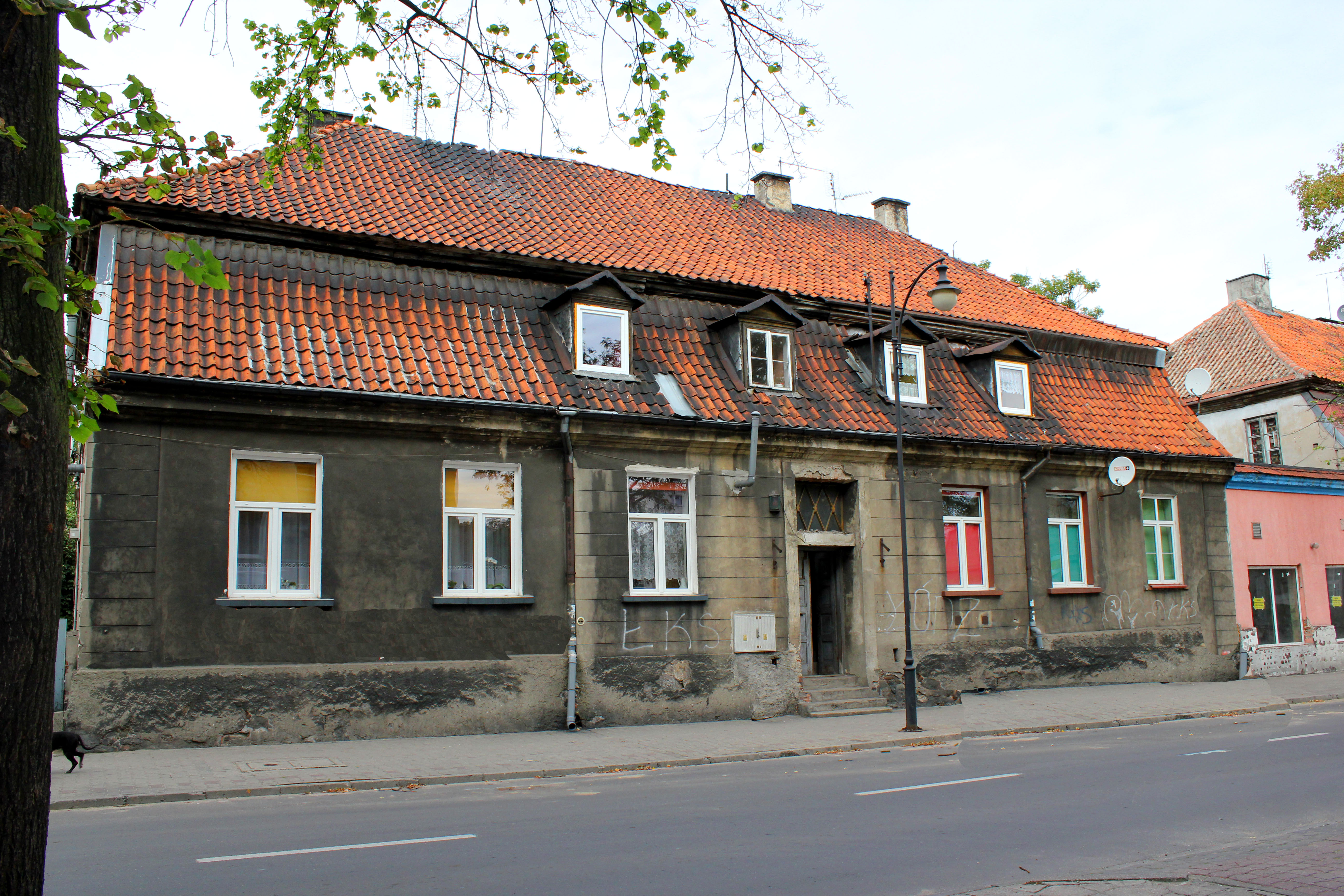 Włocławek - ul. Królewiecka 14 - dom, ok. 1800 (zabytek nr 206/354)